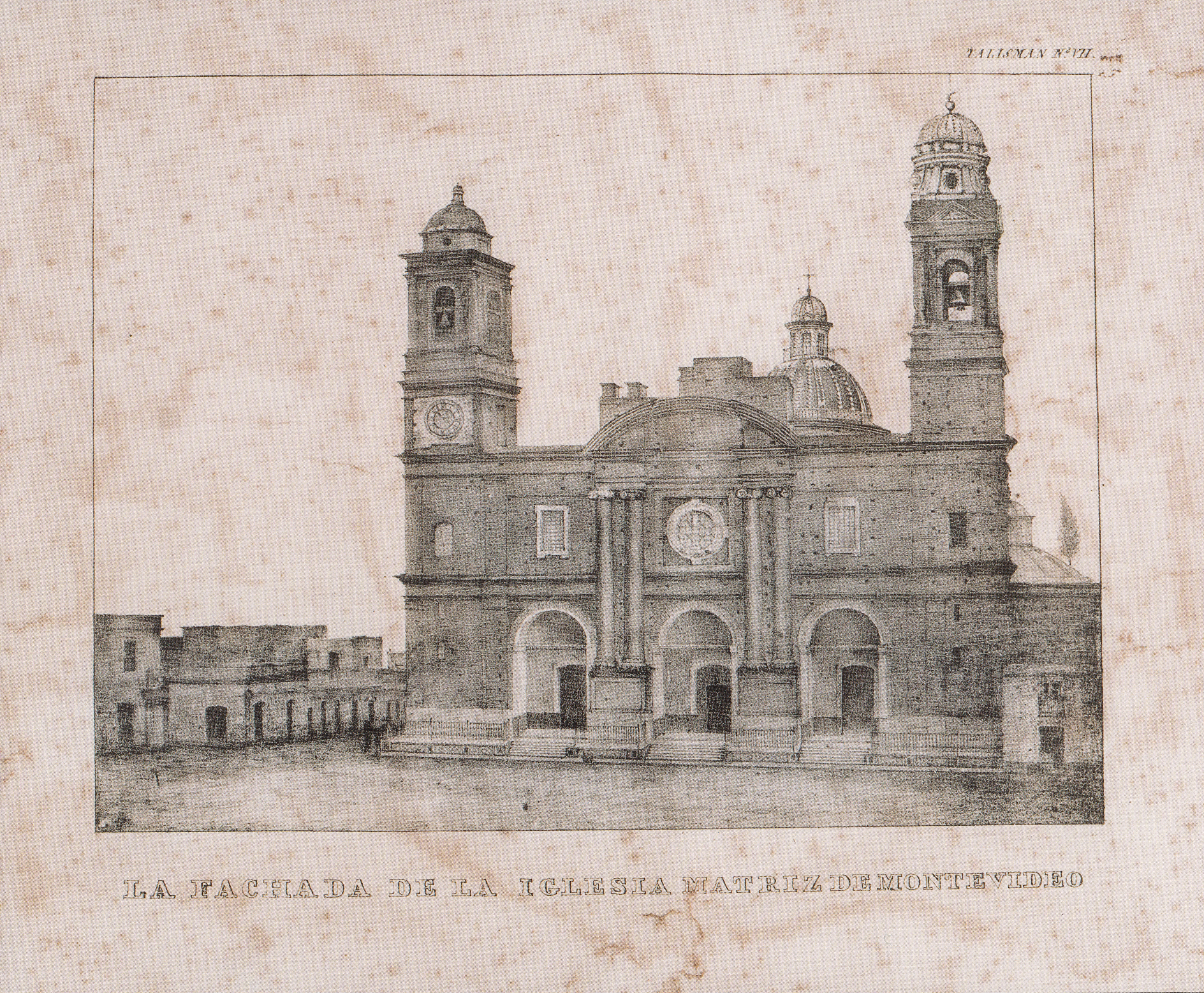 Reproducción litográfica hecha en el periódico el "El Talismán" en base a la toma fotográfica que abate Louis Compte realizó de la Iglesia Matriz de Montevideo el 29 de febrero de 1840